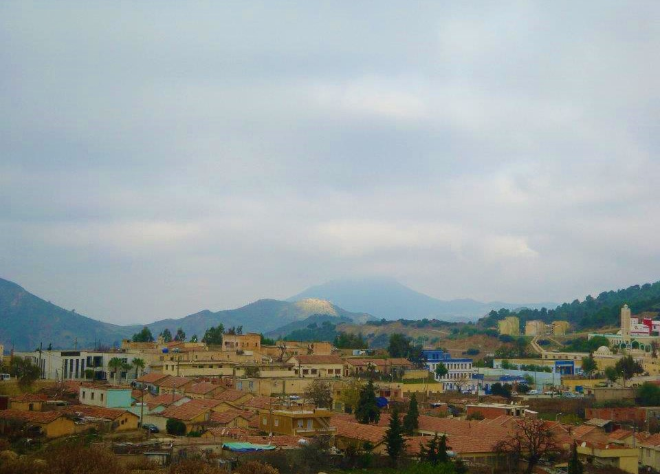 vue générale du centre ville de Lazharia, derrière on aperçoit le mont Tamdrara